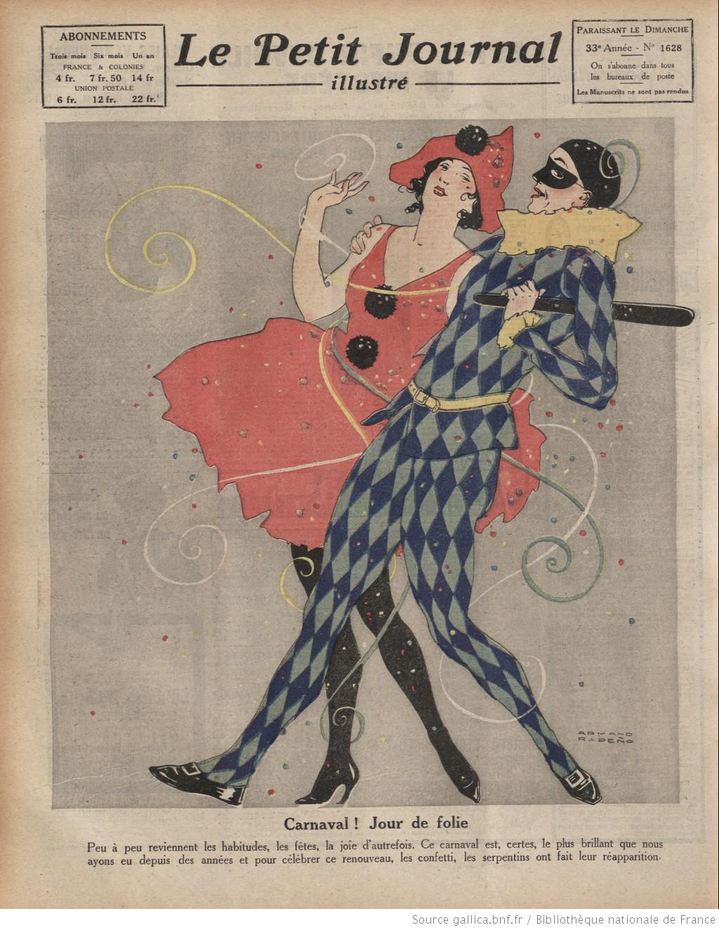 Renouveau du carnaval de Paris après la Première Guerre Mondiale. Texte : Carnaval, jour de folie. Peu à peu reviennent les habitudes, les fêtes, la joie d'autrefois. Ce carnaval est, certes le plus brillant que nous ayons eu depuis des années et pour célébrer ce renouveau, les confetti, les serpentins ont fait leur réapparition.